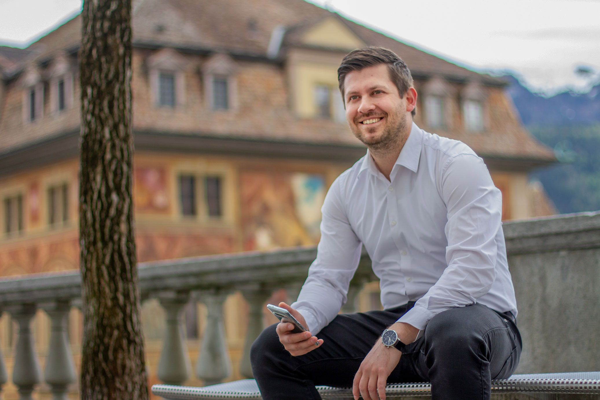 Dominik Blunschy 2019